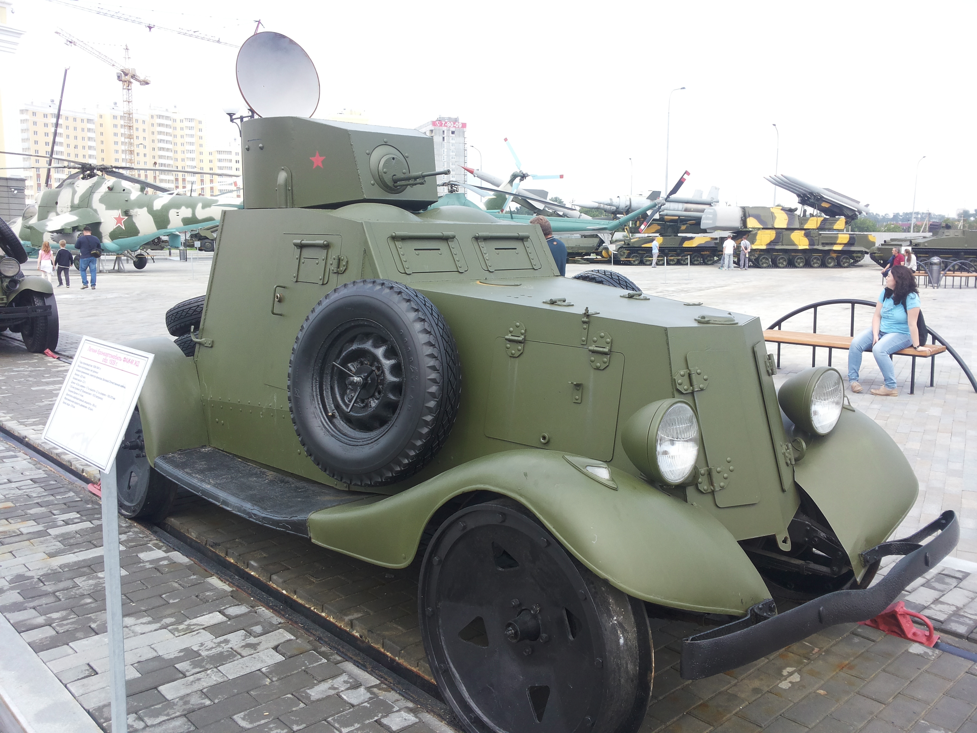 Музей военной техники «Боевая слава Урала»